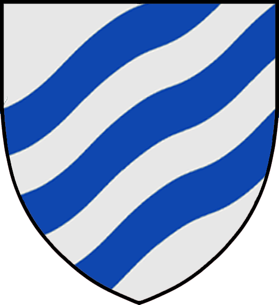 Vapensköld för svenska frälseätten Bölja från Västbo